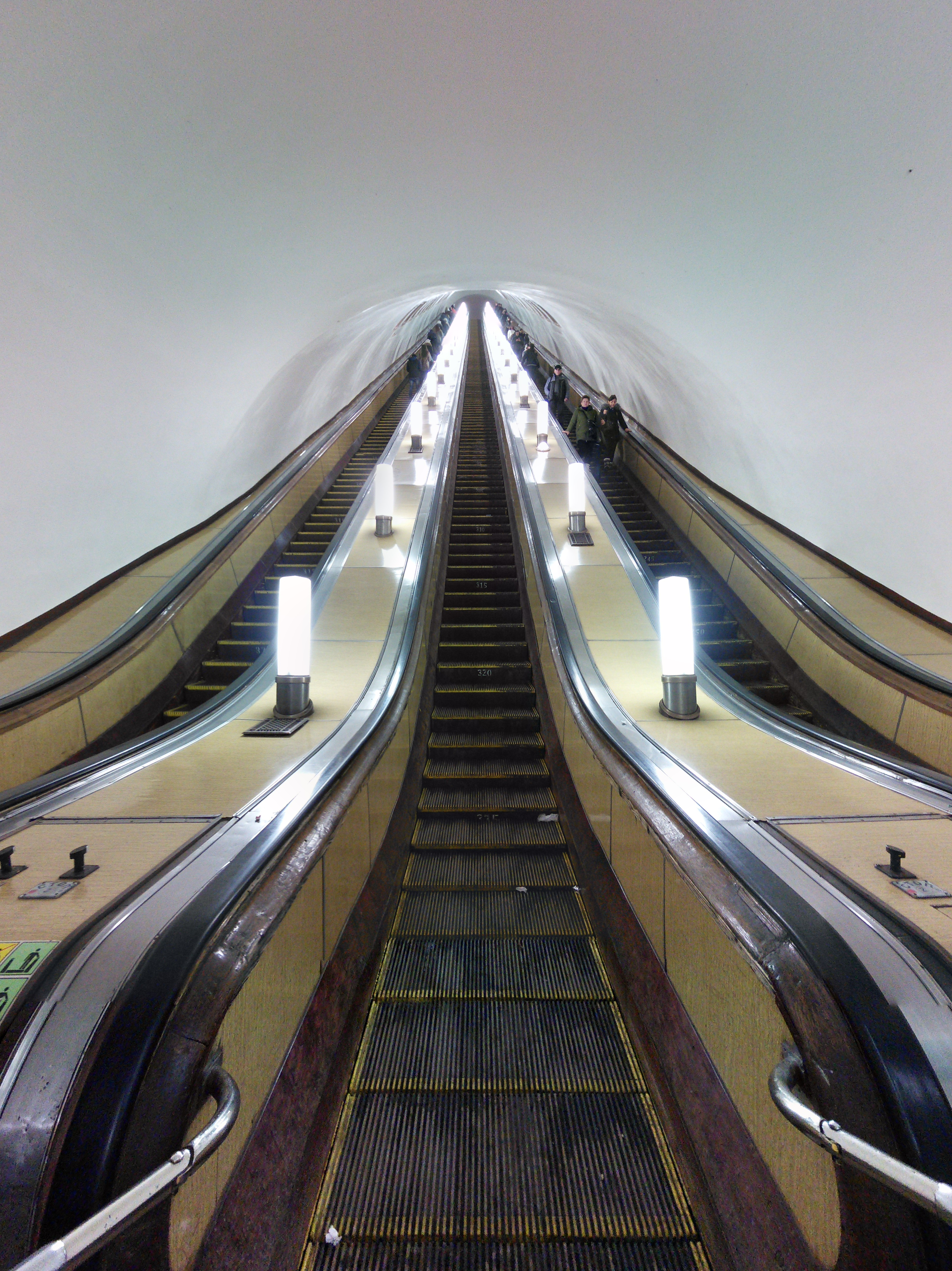 Moscow metro, Baumanskaya. Oldest tunnel escalator in world in last day of operation. Эскалатор на Бауманской в день закрытия на ремонт.